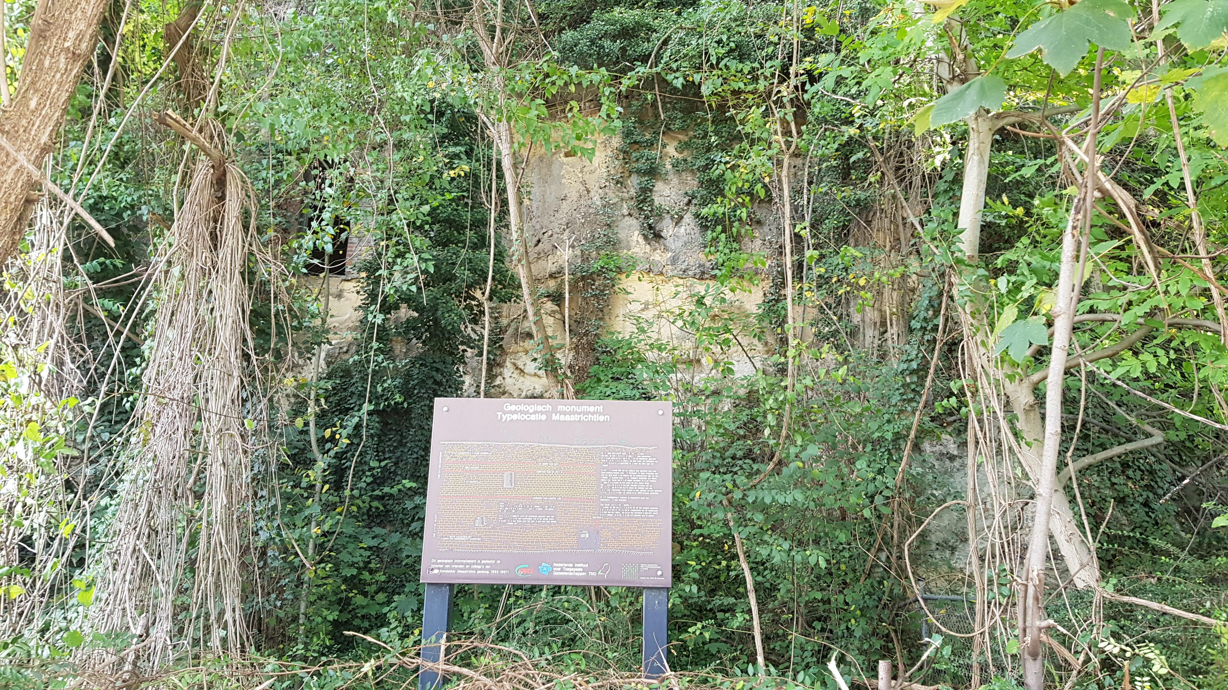 Geologisch monument Typelocatie Maastrichtien, Sint-Pietersberg, Maastricht, Nederland